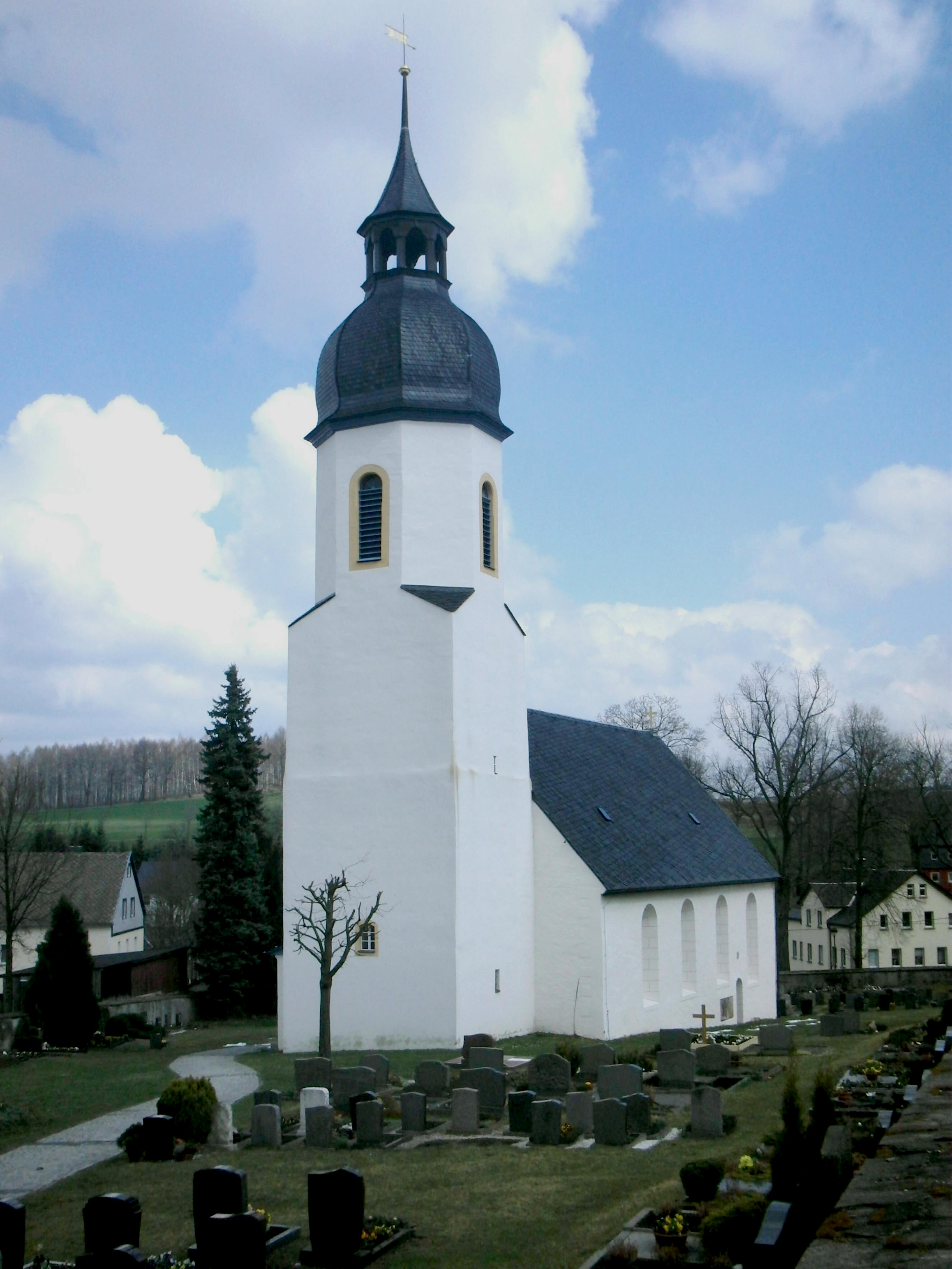 Kirche in Clausnitz im Erzgebirge. 1696 wurde die Kirche erneuert und bedeutend vergrößert.